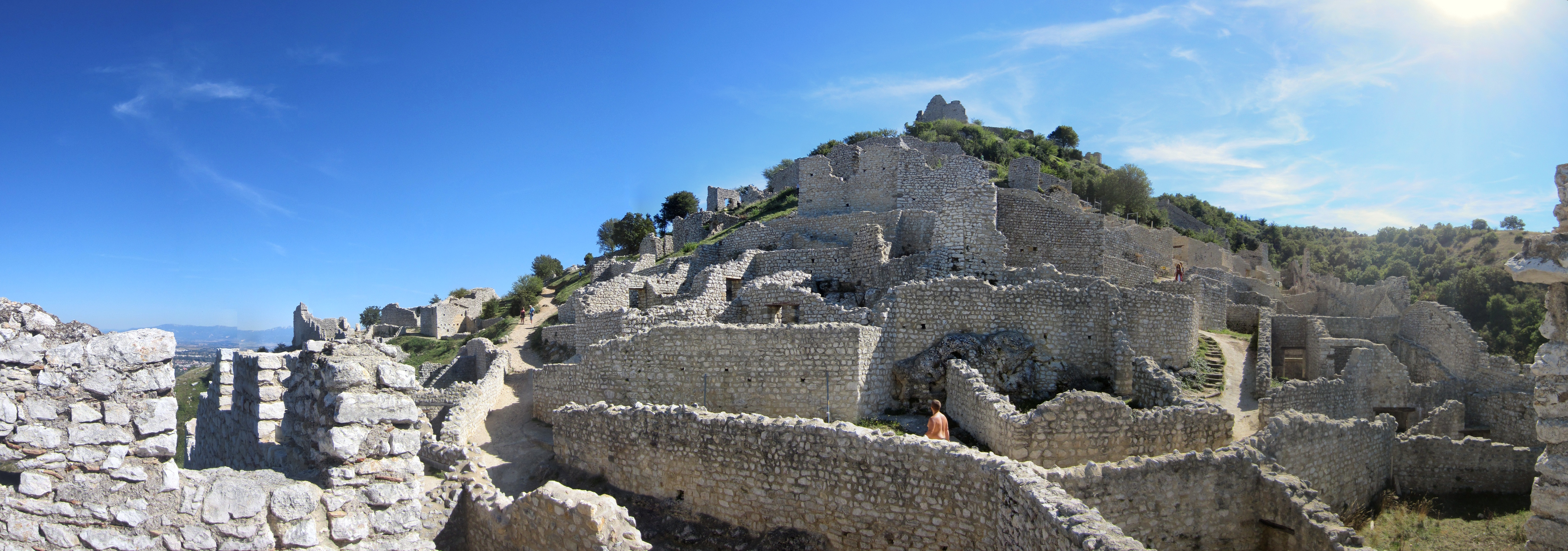 Château de Crussol (Inscrit) .